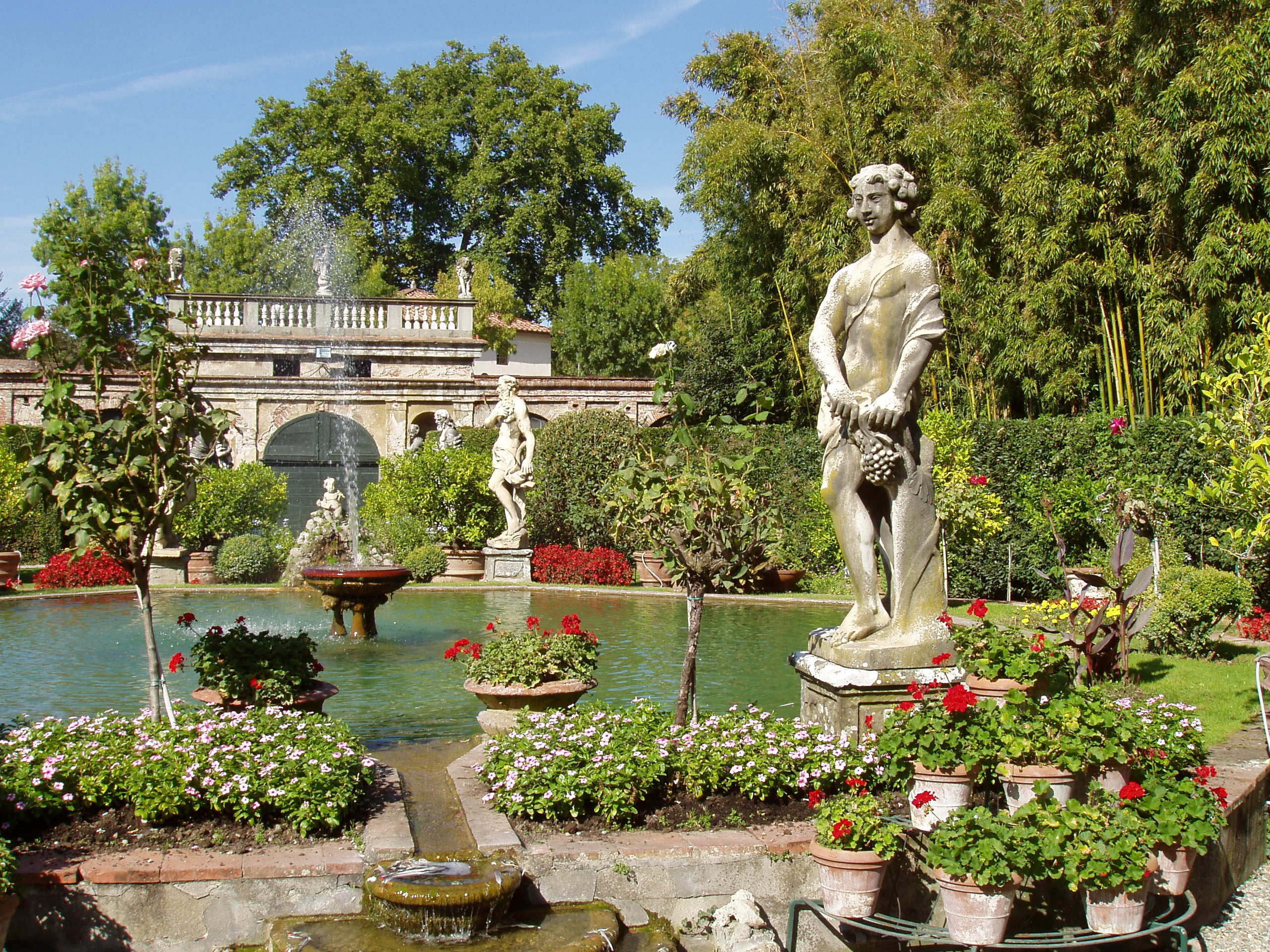 Palazzo Pfanner, Lucca, Italy - garden view.